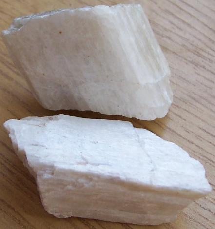 wollastonit, pochodzenie USA, autor zdjęcia Sebastian Socha 11.10. 2006 r.